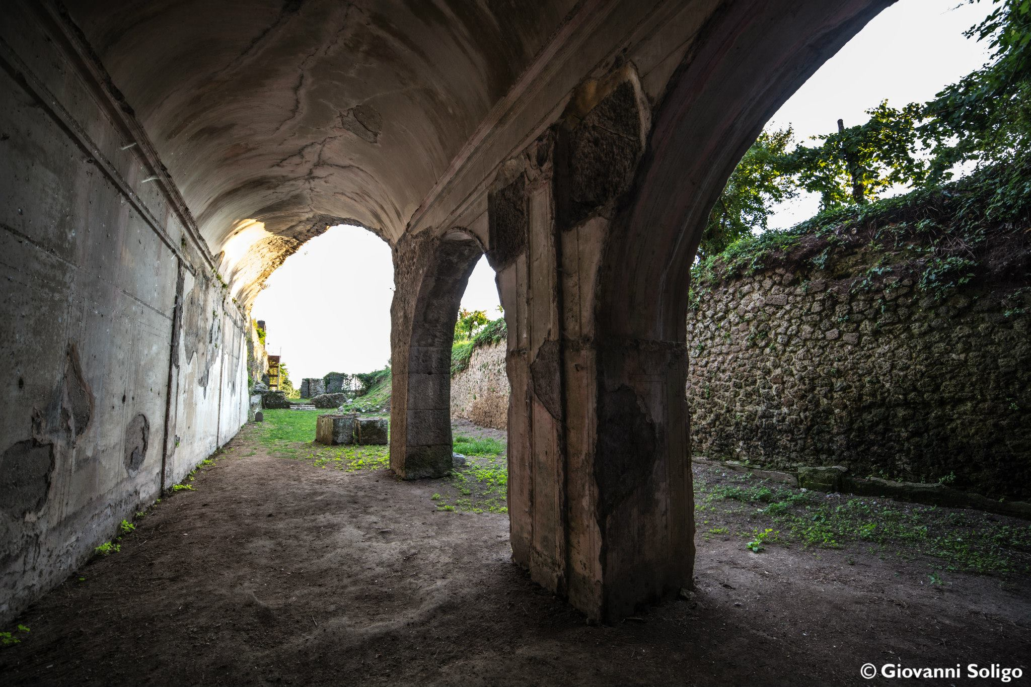 Criptoportico di Sessa Aurunca This is a photo of a monument which is part of cultural heritage of Italy.